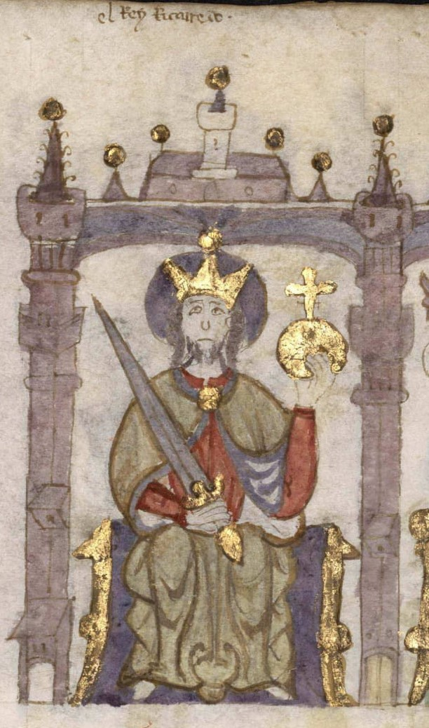 El rey godo Recaredo I, apresentado como santo en el "Compendio de crónicas de reyes" del siglo XIV